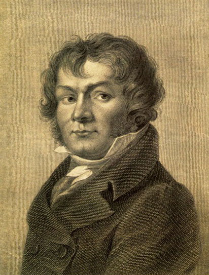 Беларуская (тарашкевіца): Партрэт Вінцэнта Герберскага (Vincent Hierbierski)